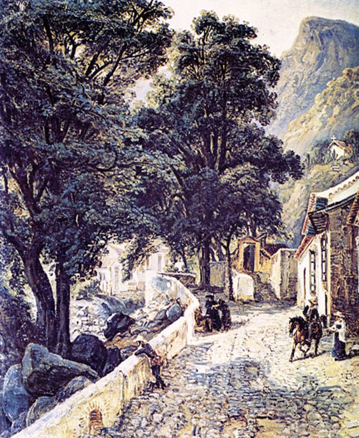 Puente de Jesús - Pintura de F. Bellermann